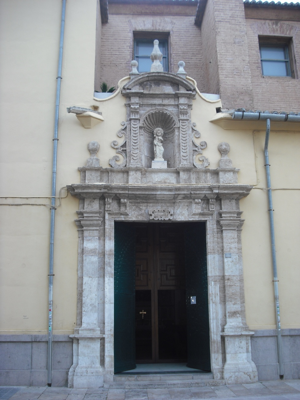 Puerta de la Iglesia de Santiago de Moncada.